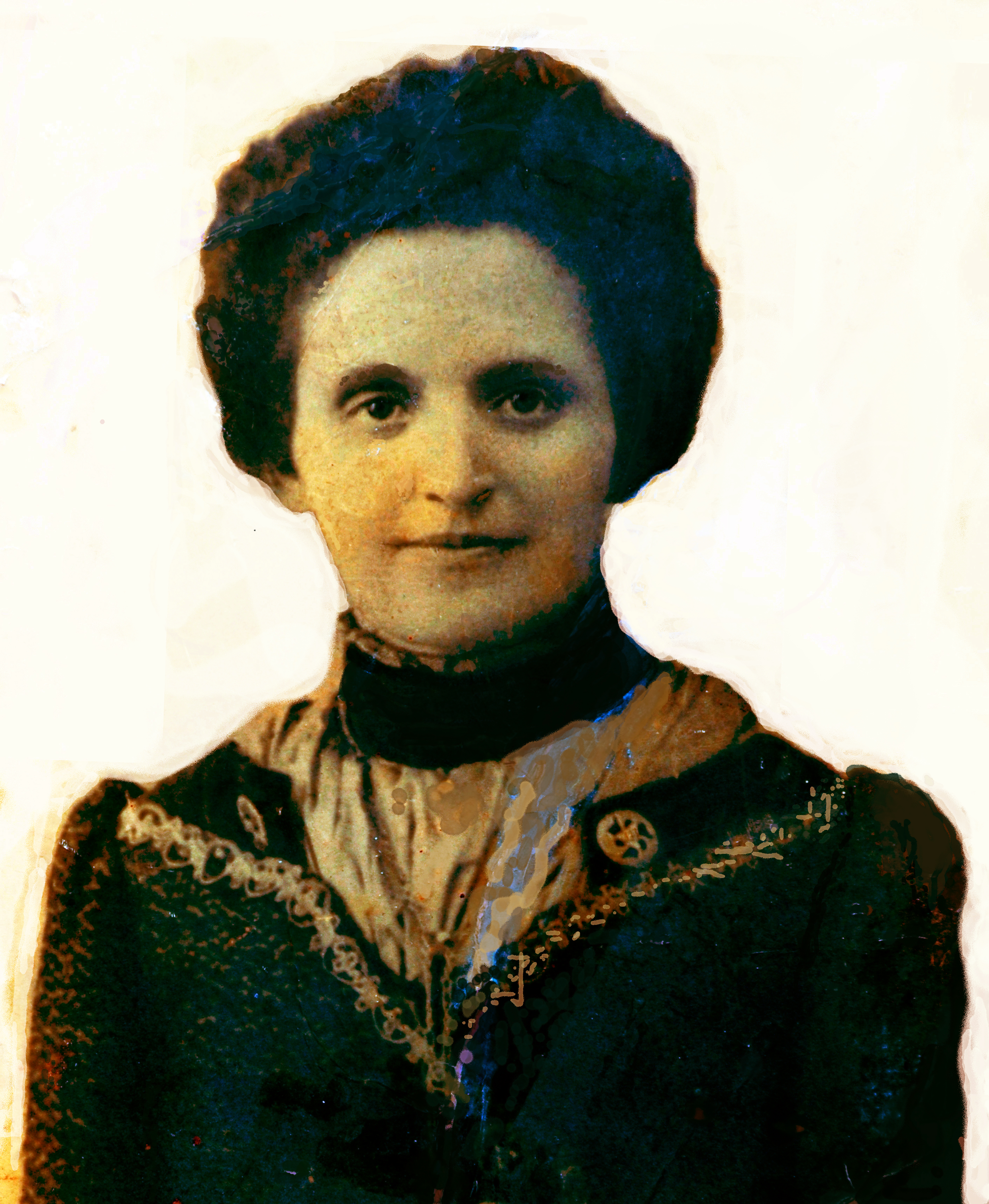 Гущо Ядвига Валериановна (1868-1918) Фотография из личного архива